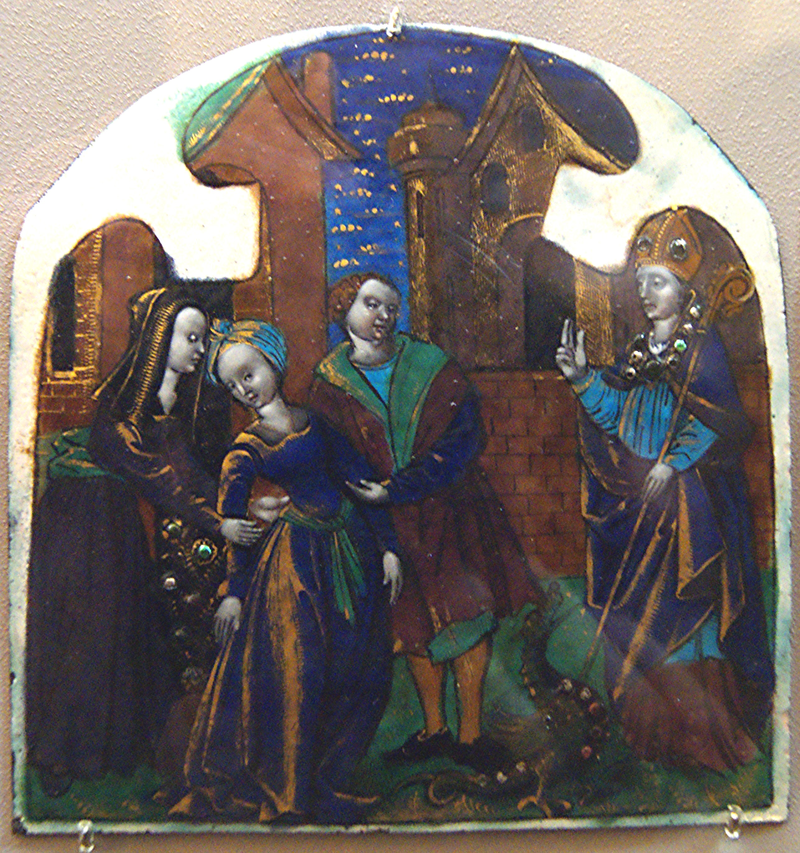 Maître du triptyque de Louis XII (?), 1503, émail peint, 25x65 mm, cathédrale Saint-Pierre et Saint-Paul, Troyes